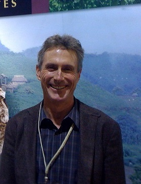 1er Champion du monde de triathlon